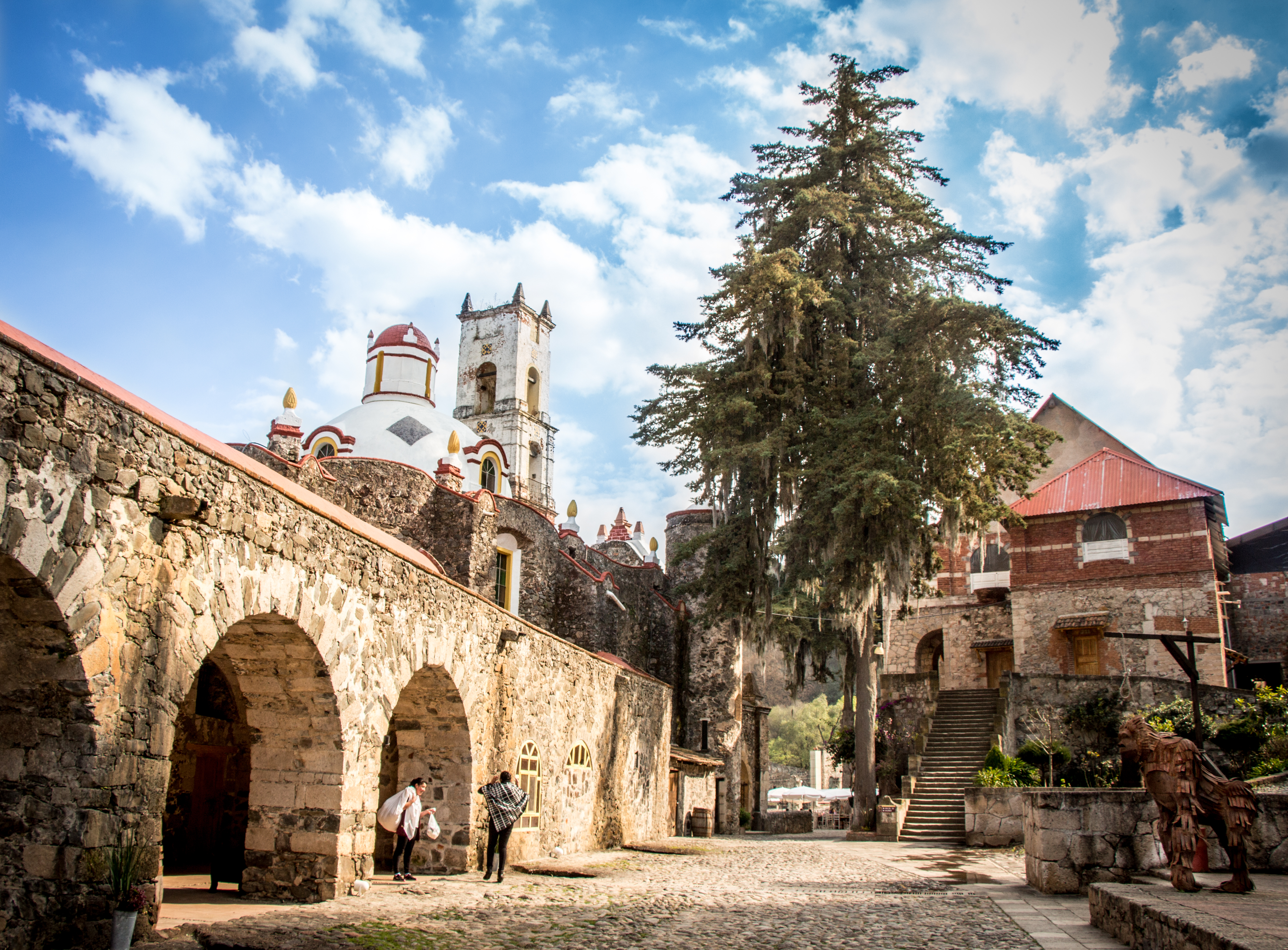 Santa Maria Regla Hacienda, Huasca de Ocampo, Hidalgo, Mexico